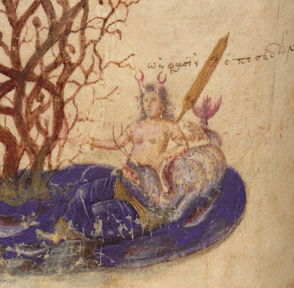 Thalassa (Thalatta), die Personifikation des Meeres (Wiener Dioskurides, Carmen de viribus herbarum. Ausschnitt aus Blatt 391 verso)